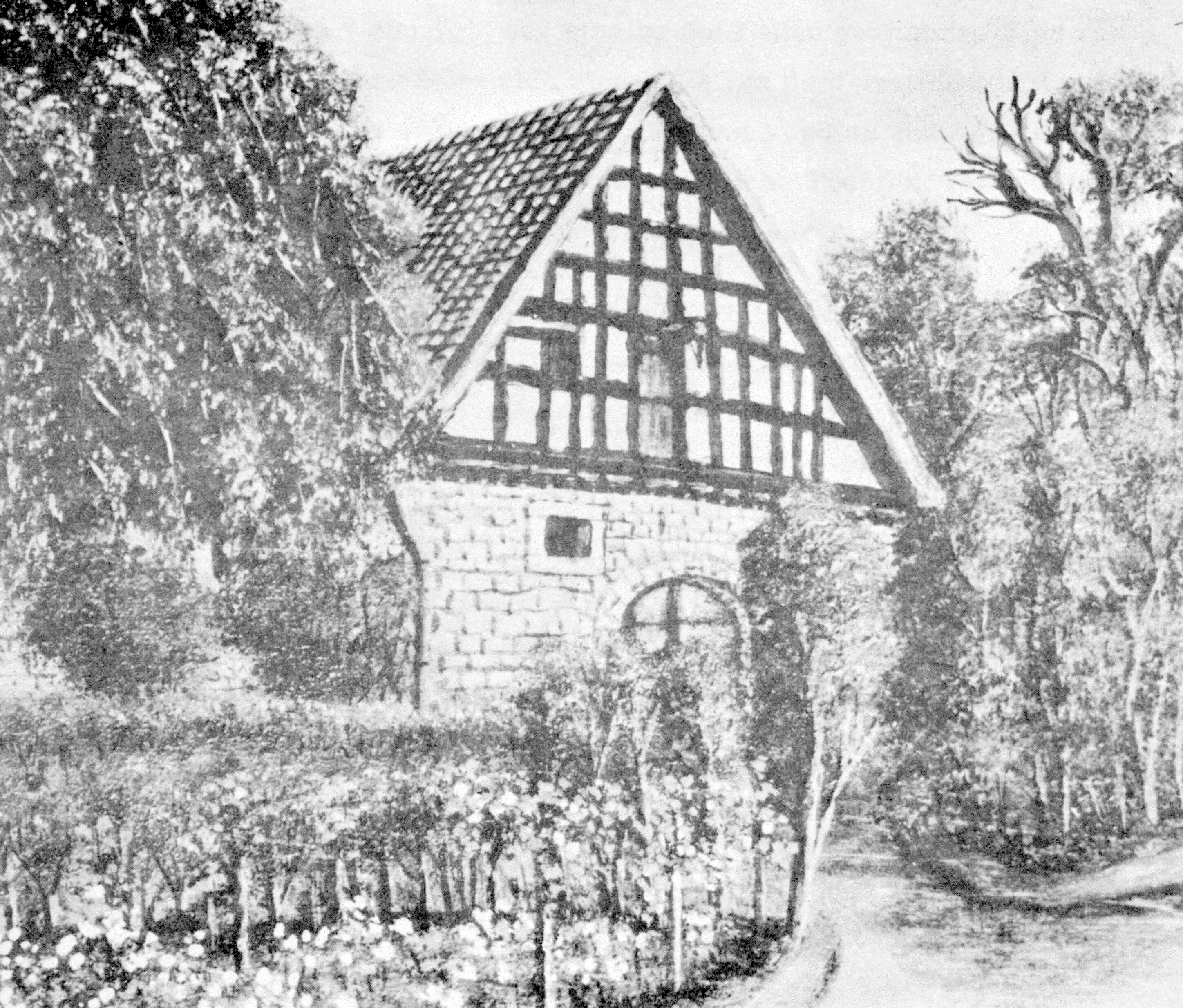 Foto von Hermann Vöchting